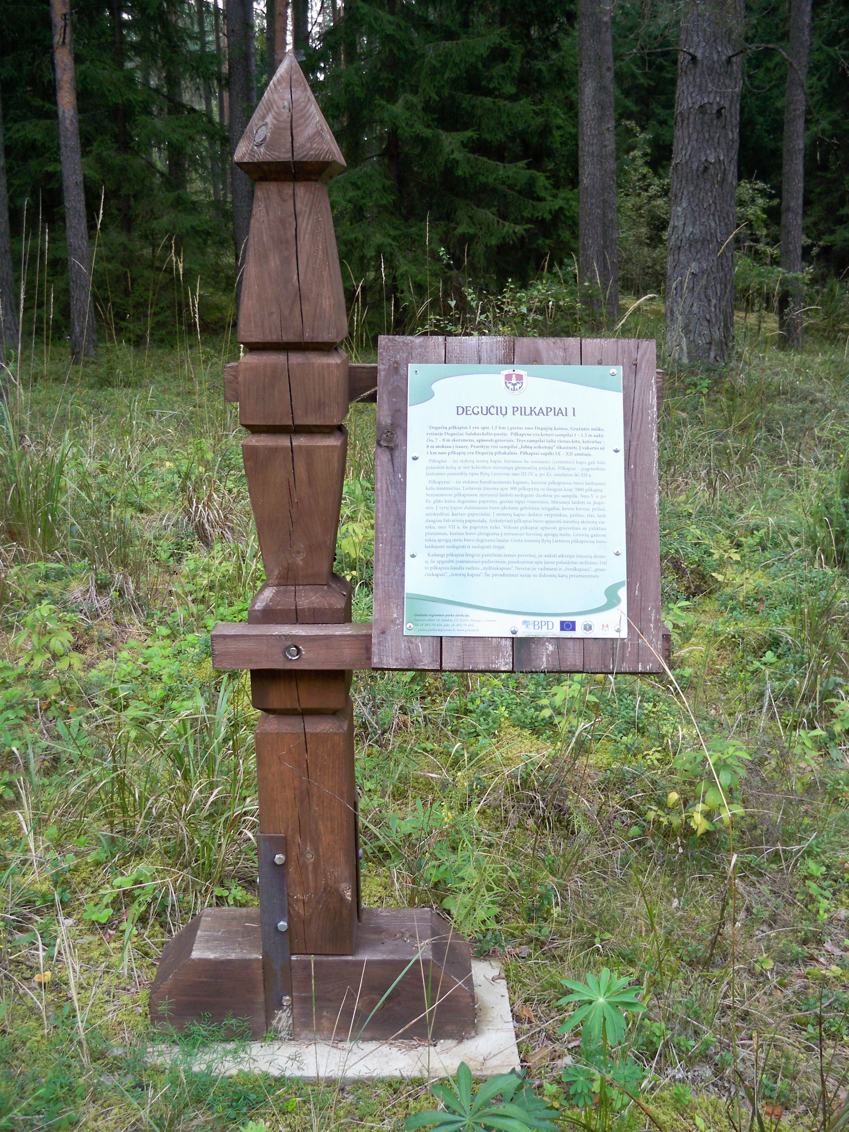 Degučių pilkapiai.